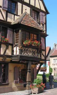 oriel d'une maison de Turkheim en Alsace.